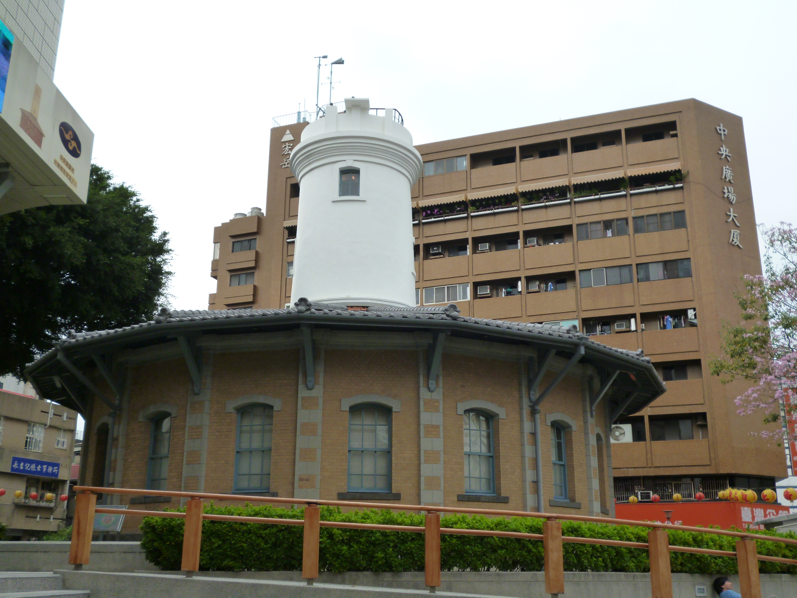 原台南氣象測候所